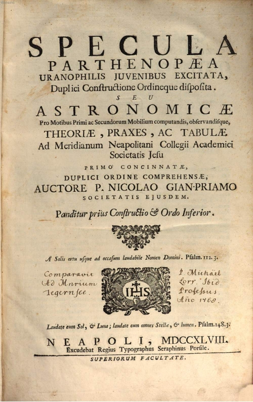 Frontespizio del volume di Niccolò Gianpriamo, 1748